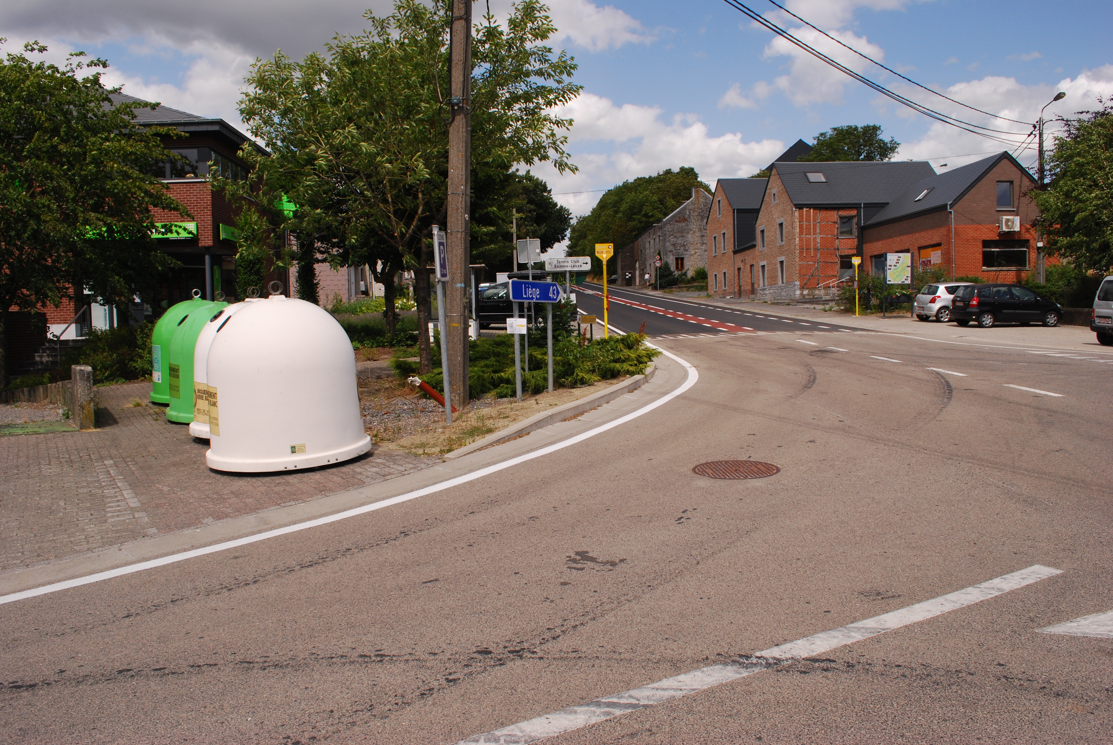 La rue de Liège à Somme-Leuze, à hauteur de l'église Saint-Rémy.